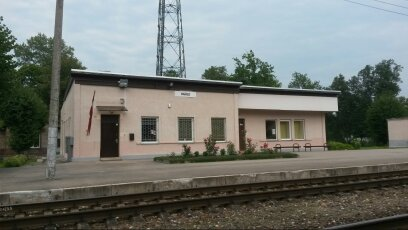 Ugāles stacija 2016. gadā